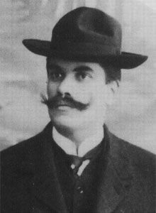 Václav Laurin (1865 - 1930), Český technik, podnikatel a průmyslník.